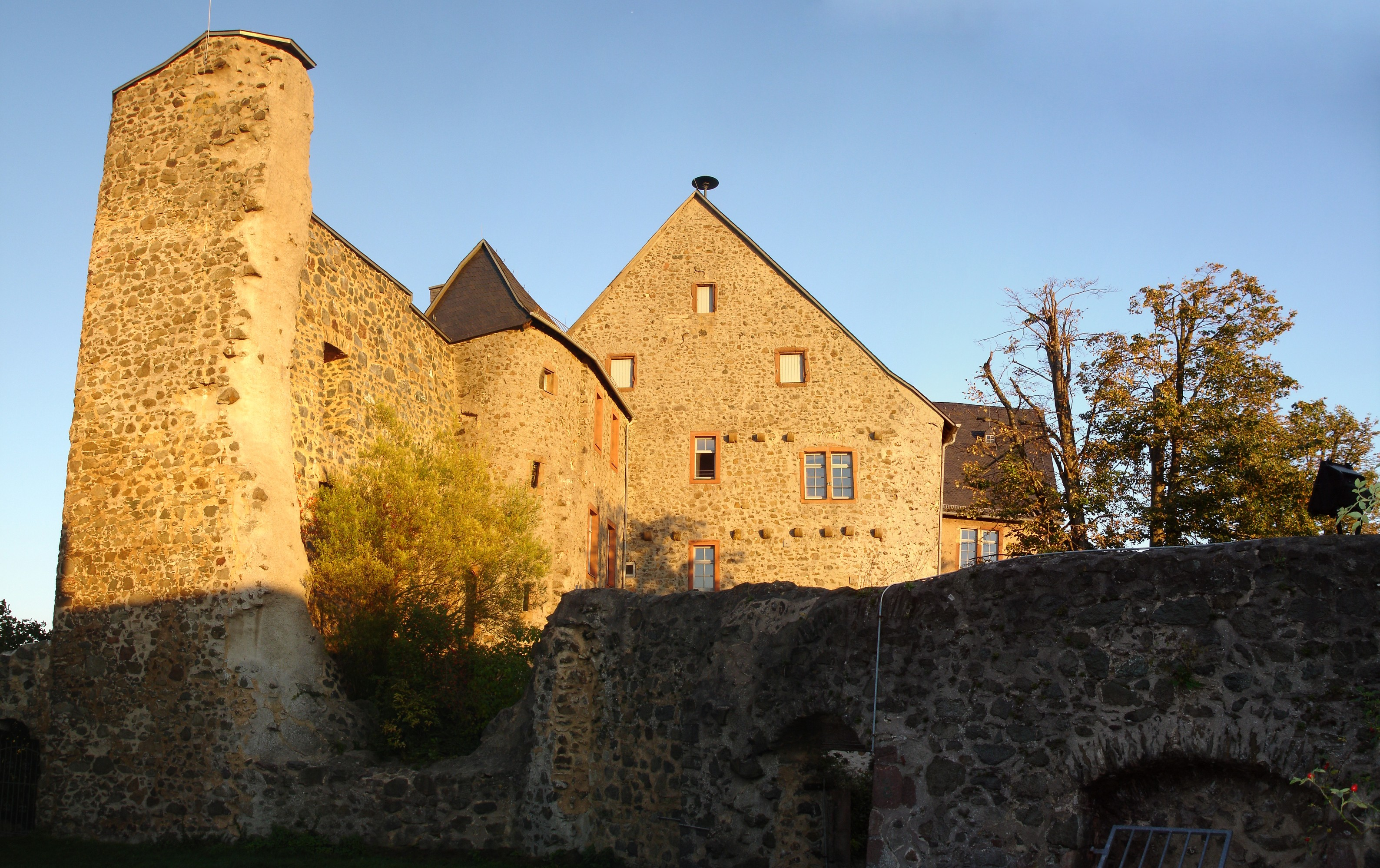 Hauptgebäude der Burg Hohensolms von Westen